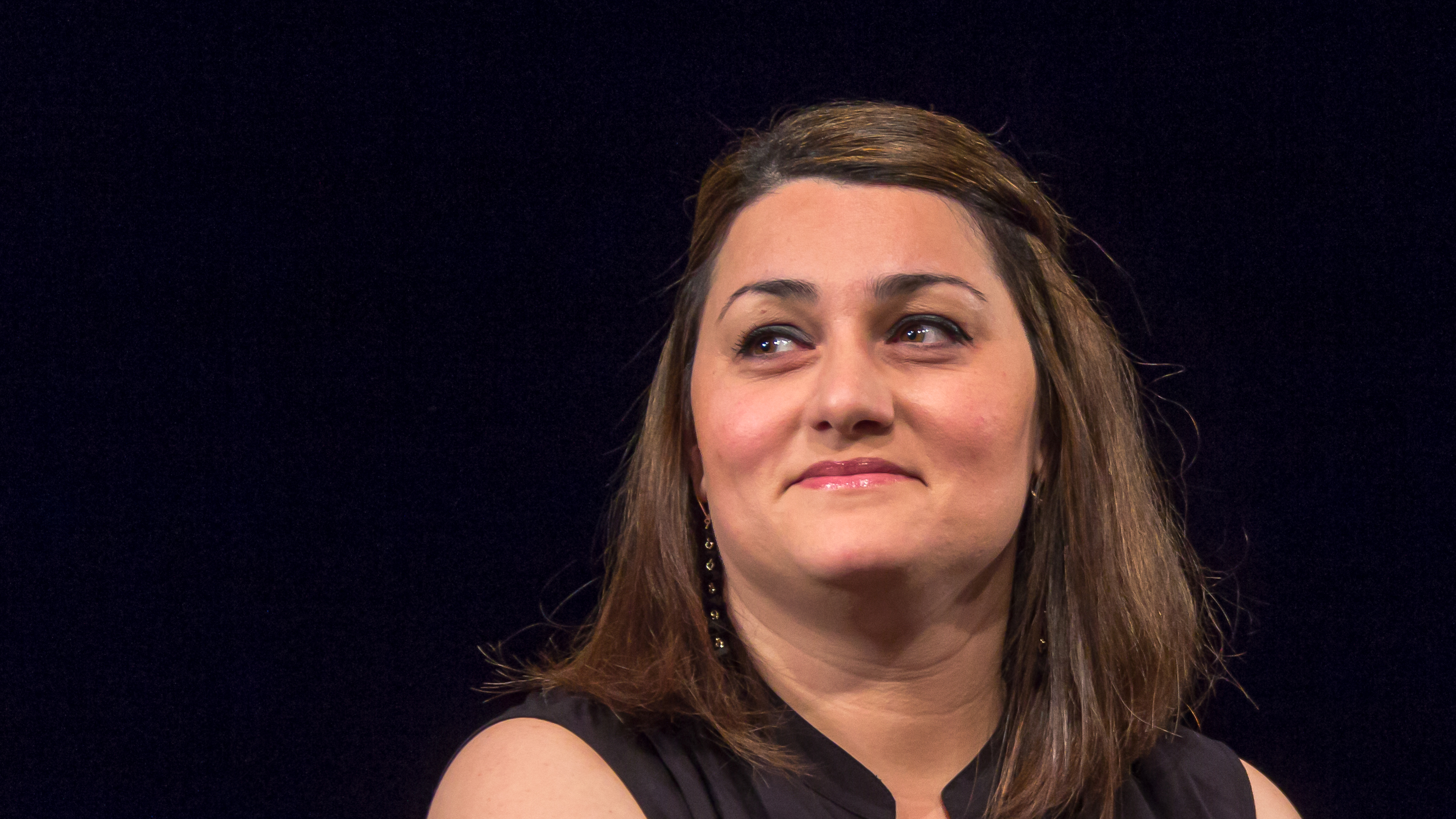 Birlikte - Zusammenstehen - 2015Veranstaltung im Depot 1 Schauspiel Köln: Deutsche Identitäten im 21. Jahrhundert –Eine Diskussionsrunde des Arsch huh e. V. Mit Lamya Kaddor (Islamwissenschaftlerin), Prof. Aladin El-Mafaalani (Professor für Politikwissenschaft), Sheila Mysorekar (Journalistin und Autorin) und Guntram Schneider (Minister für Arbeit, Integration und Soziales des Landes), Moderation: Fatih Çevikkollu (Kabarettist) Foto: Lamya Kaddor